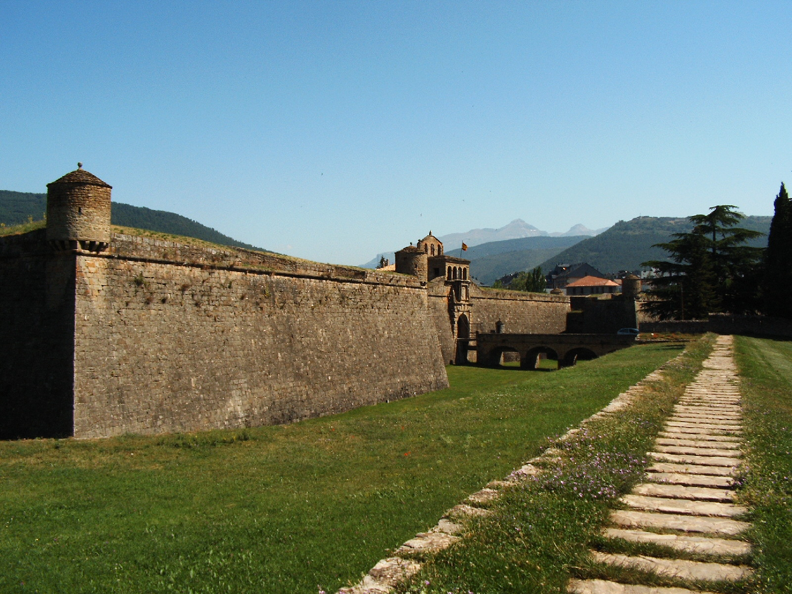 Baluartes de la fortaleza de Jaca (Huesca, España).